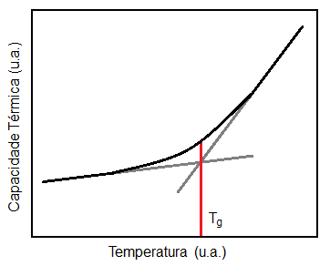 Capacidade térmica de um material vítreo em função da temperatura, indicando a temperatura de transição vítrea (Tg - intersecção das retas tangentes)